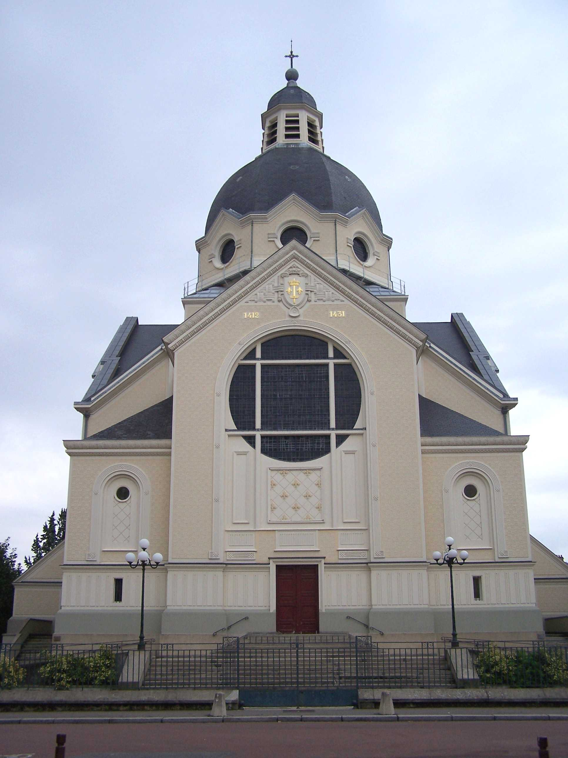 Église Sainte-Jeanne-d'Arc à Versailles (Yvelines, France), place Élisabeth Brasseur